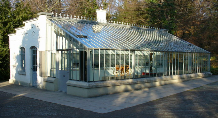 Gottlieb Daimlers Gewaechshaus Stuttgart-Bad Cannstatt Kurpark self made photo by user:Enslin at 8 JAN 2006 in Stuttgart-Bad Cannstatt